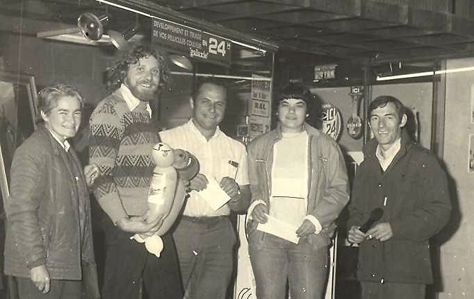 Partie de l'équipe de Radio des Cantons de gauche à droite Bernadette Christian 2 auditeurs gagnants à un jeu et Jean